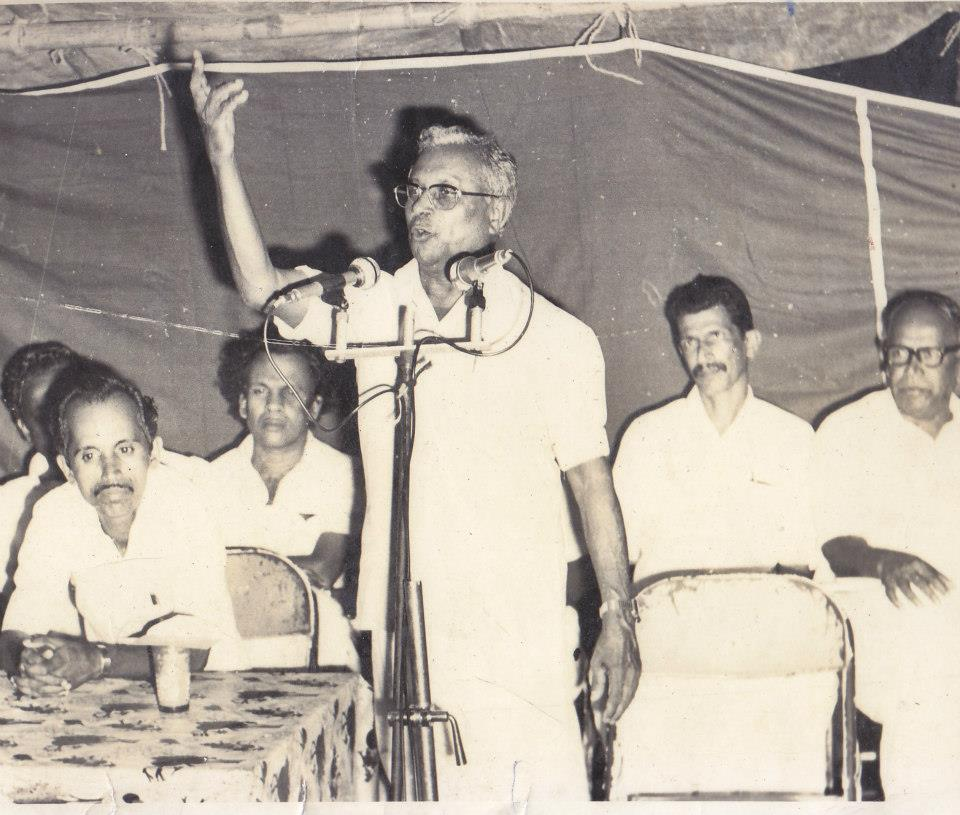 പഴയ കാലം .....സഖാവ് ഇമ്പിച്ചി ബാവ സംസാരിക്കുന്നു. പി.കരുണാകരന്‍,എ . കെ നാരായണന്‍ ടി.കെ.സി,ടി.വി.ഗോവിന്ദന്‍ എന്നിവര്‍ തൊട്ടടുത്ത്